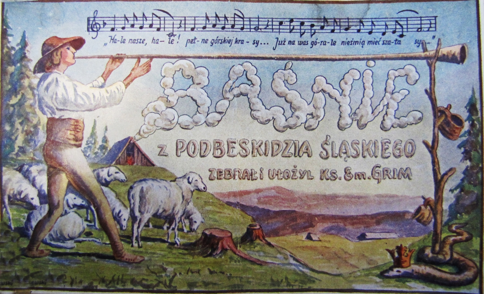 Grim Emanuel, Baśnie z Podbeskidzia Śląskiego, Cieszyn, 1929, Drukarnia "Dziedzictwa", 57 s. 16 x 23 cm